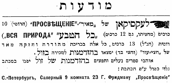 לכסיקון כל הטבע